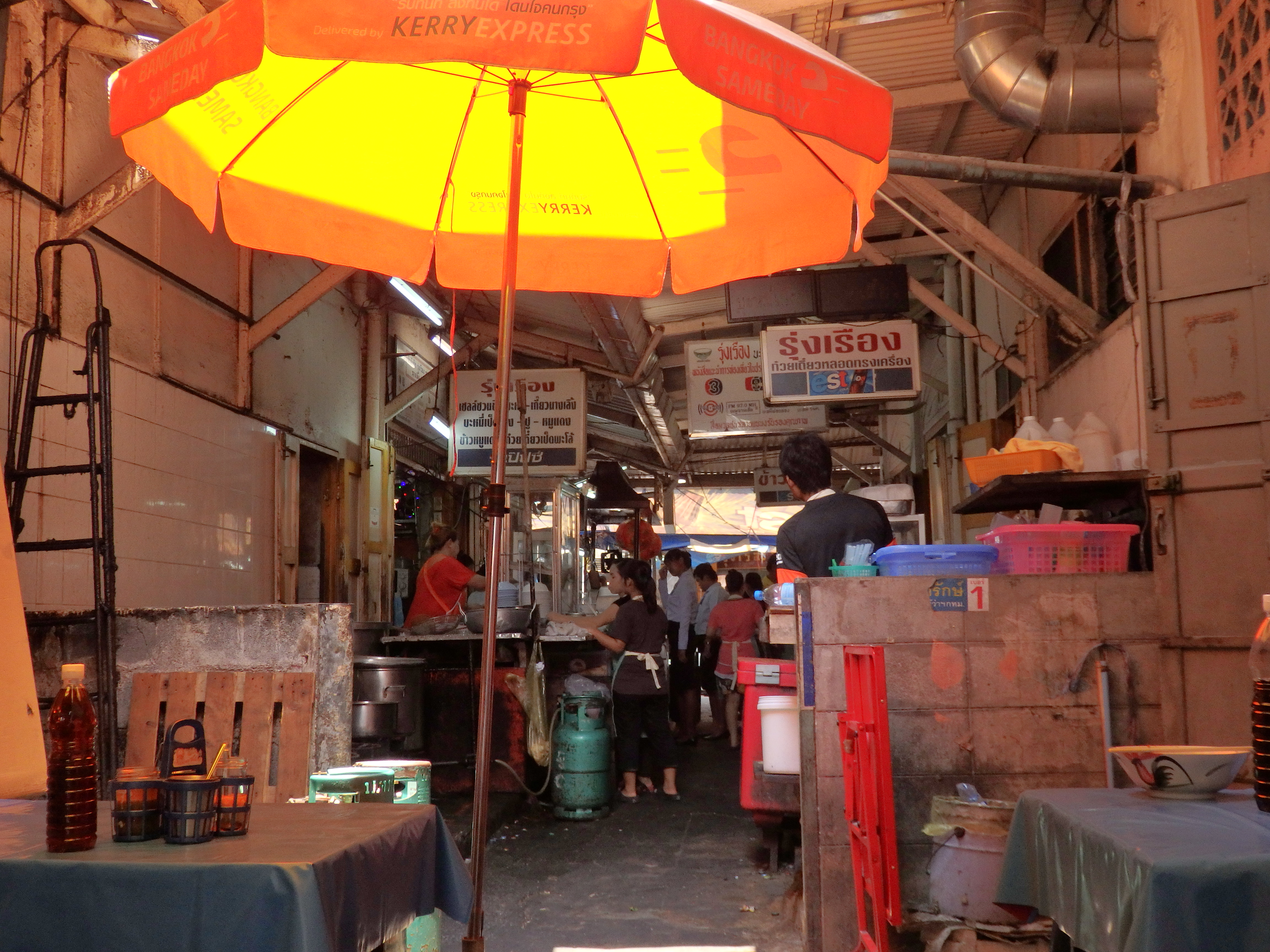 Wat Sommanat, Pom Prap Sattru Phai, Bangkok 10100, Thailand